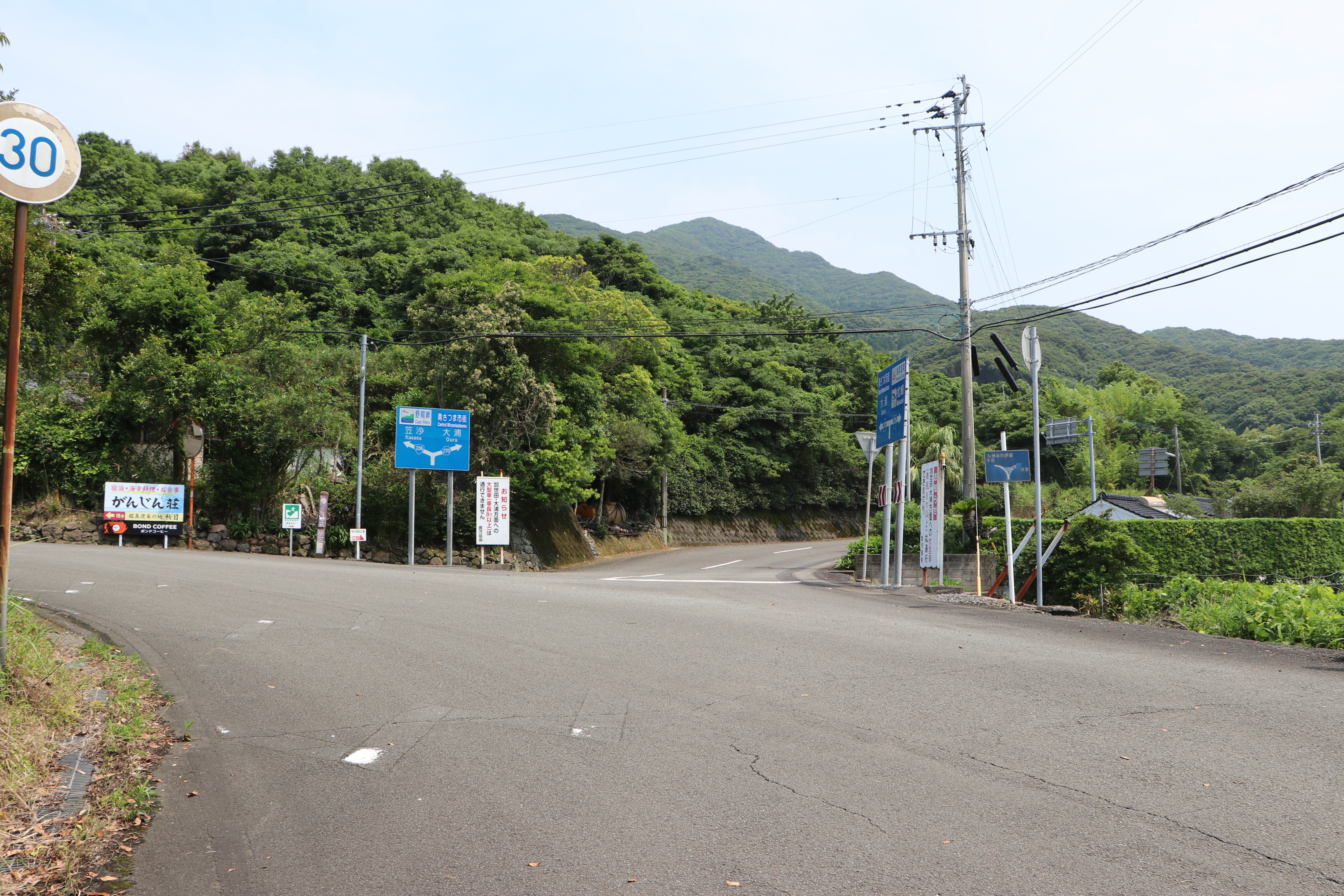 国道226号と交差する鹿児島県道270号久志上津貫線。 Canon EOS 80D